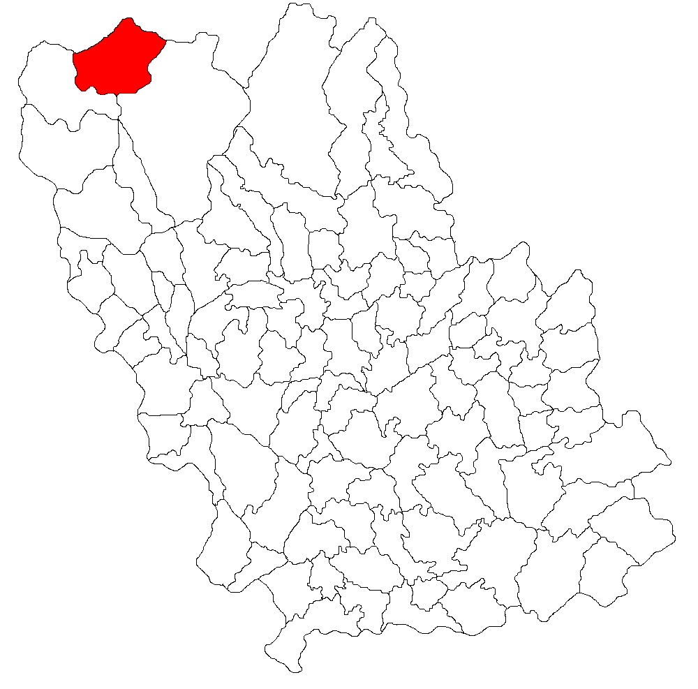 Categorie:Hărţi ale judeţului Prahova